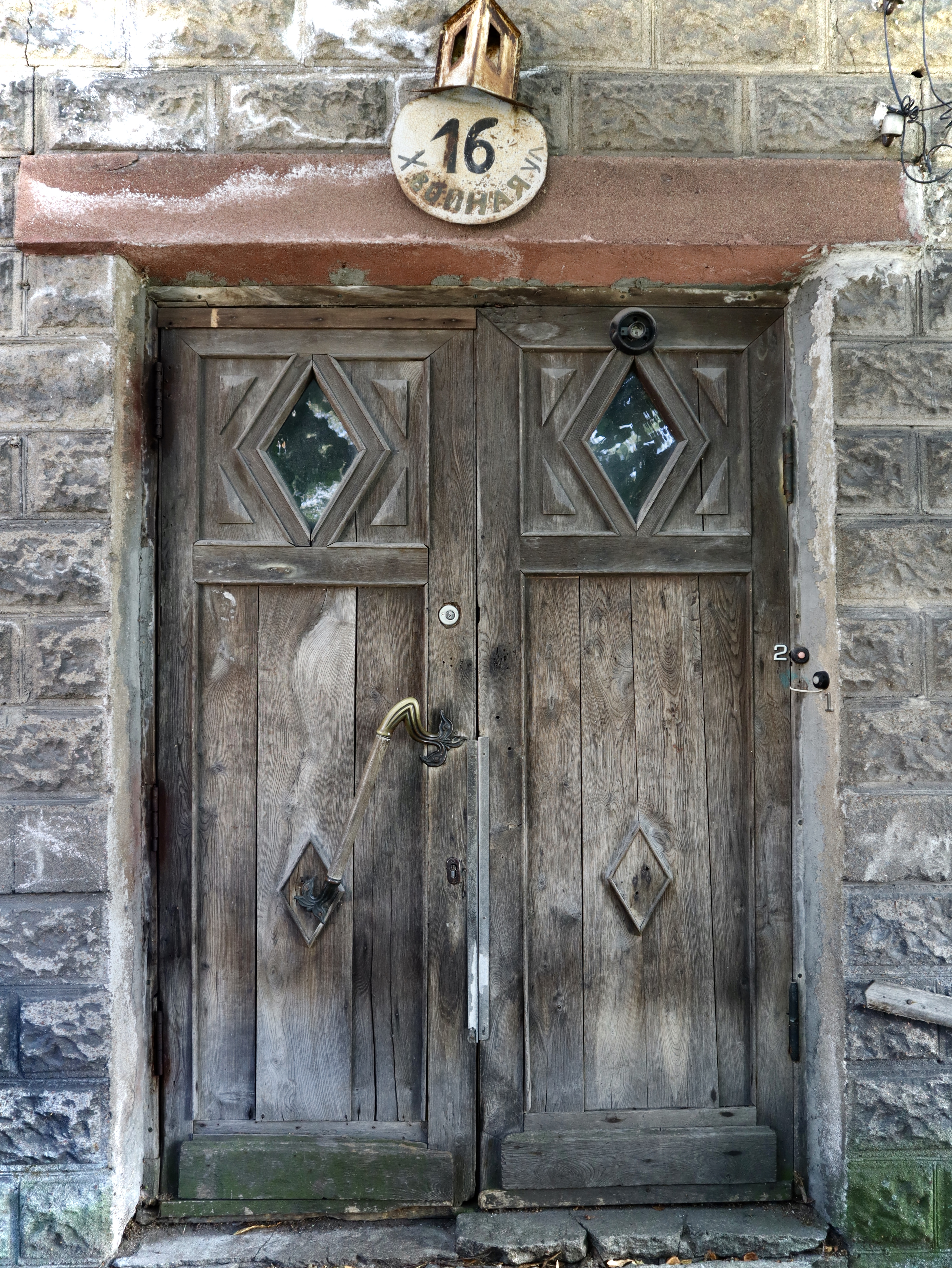 Дача Г.Ф. Вольдта: Хвойная улица, 16, Ключевой проспект, Ольгино, Приморский район, Санкт-Петербург